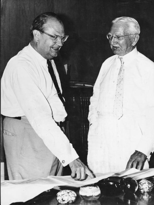 Zentralbild 6.11.1963 Schacht sieht "gute wirtschaftliche Möglichkeiten" für die Bahamas Als wohlmeinender Onkel fühlte sich offensichtlich der frühere Reichsbankpräsident Dr. Hjalmar Schacht bei seinem Besuch im Oktober 1962 auf den Bahamainseln, von denen er sagte, daß sie "gute Möglichkeiten für den Aufbau von Spezialbetrieben böten" und der Fremdenverkehr gefördert werden sollte. UBz. Dr. Schacht (rechts), der einst durch hohe Finanzzuschüsse die Nazipartei stützte, im Gespräch mit Stafford Sands, dem Vorsitzenden des "Wirtschaftsförderungsausschusses" der Bahamas. (vom 27.10.1962)